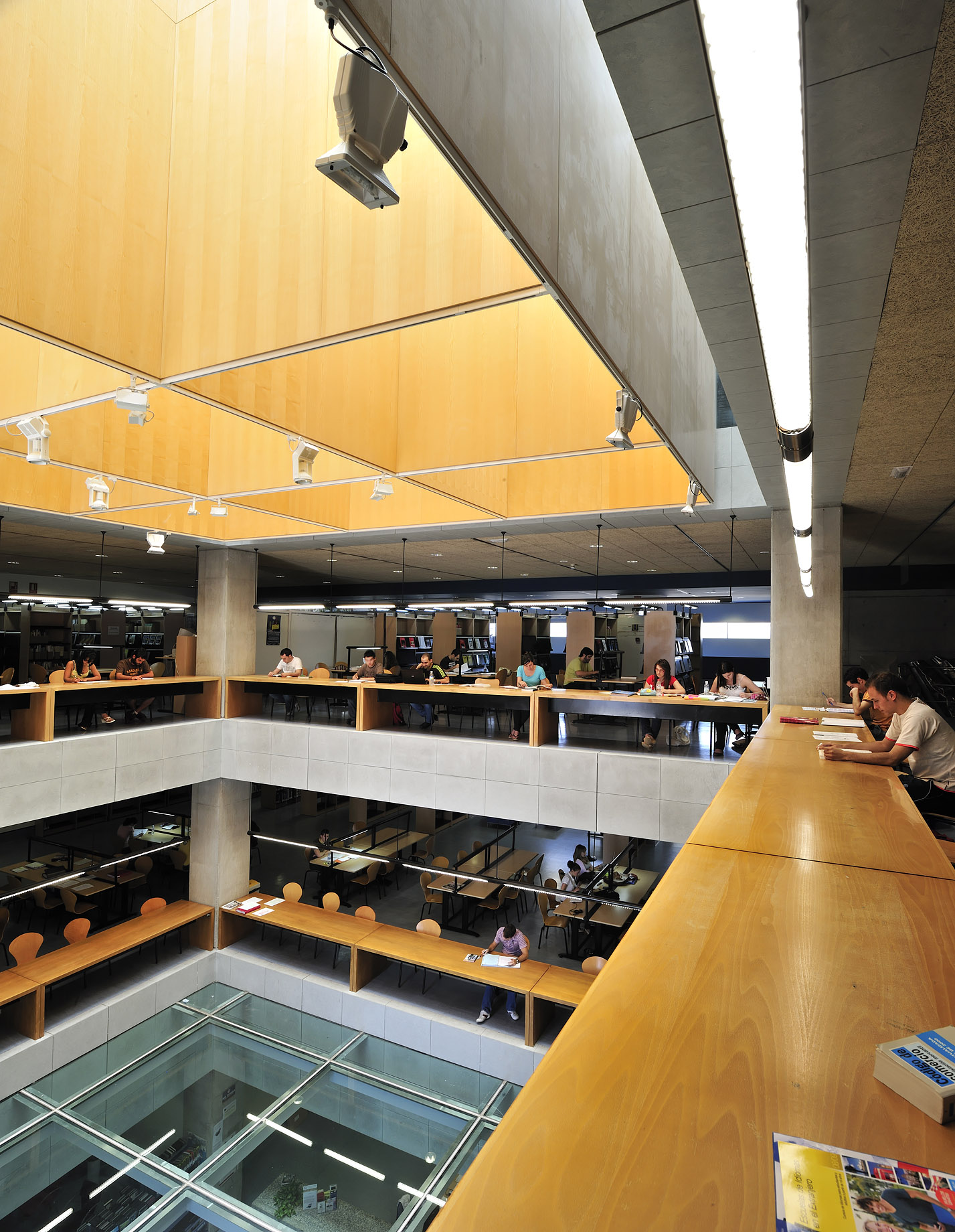 Espinardo, Murcia 2009